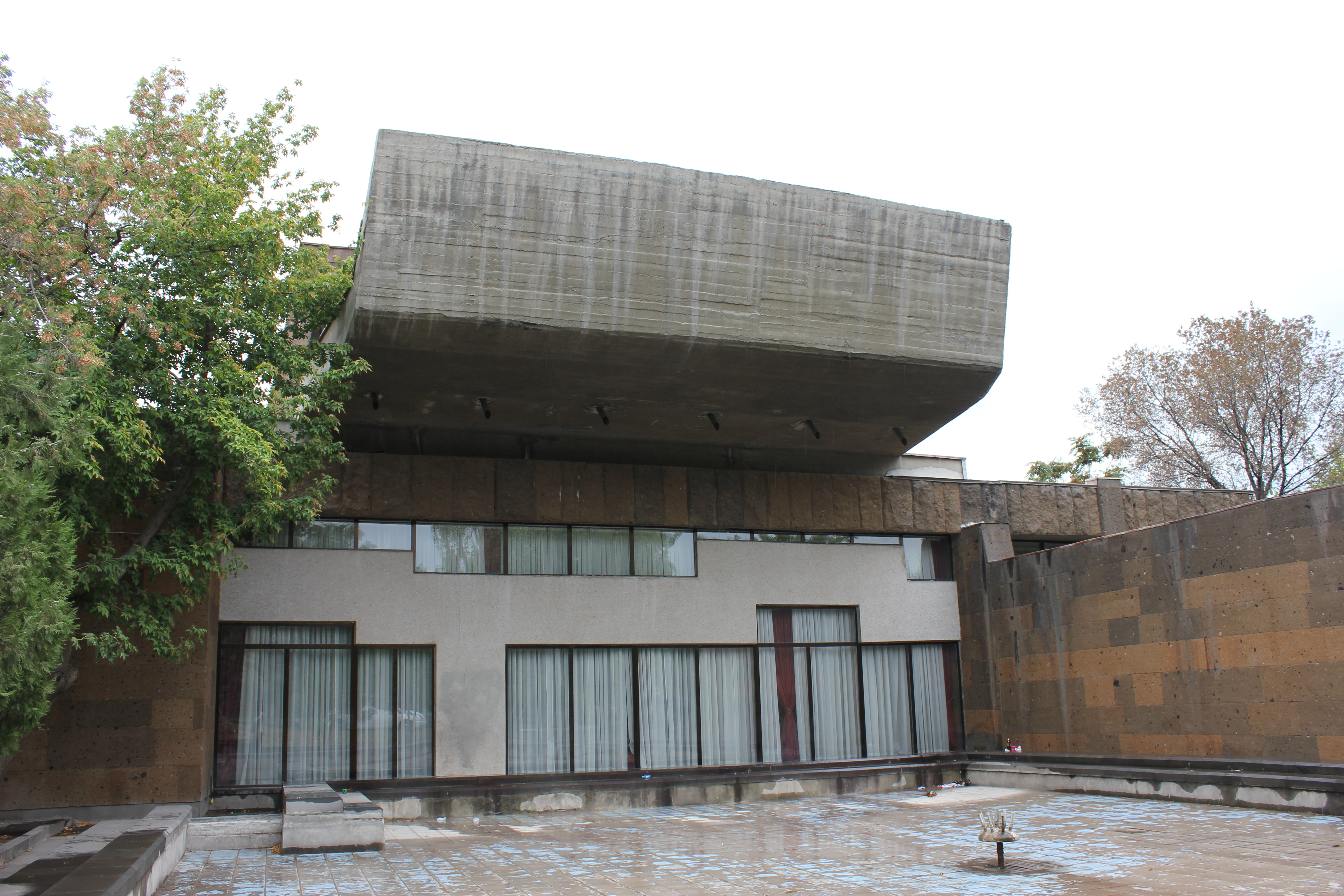 Երևանի Կոմիտասի անվան կամերային երաժշտության տունը, 1977 թ. Իսահակյան փող. , Ճարտ.` Ս. Քյուրքչյան 6/91